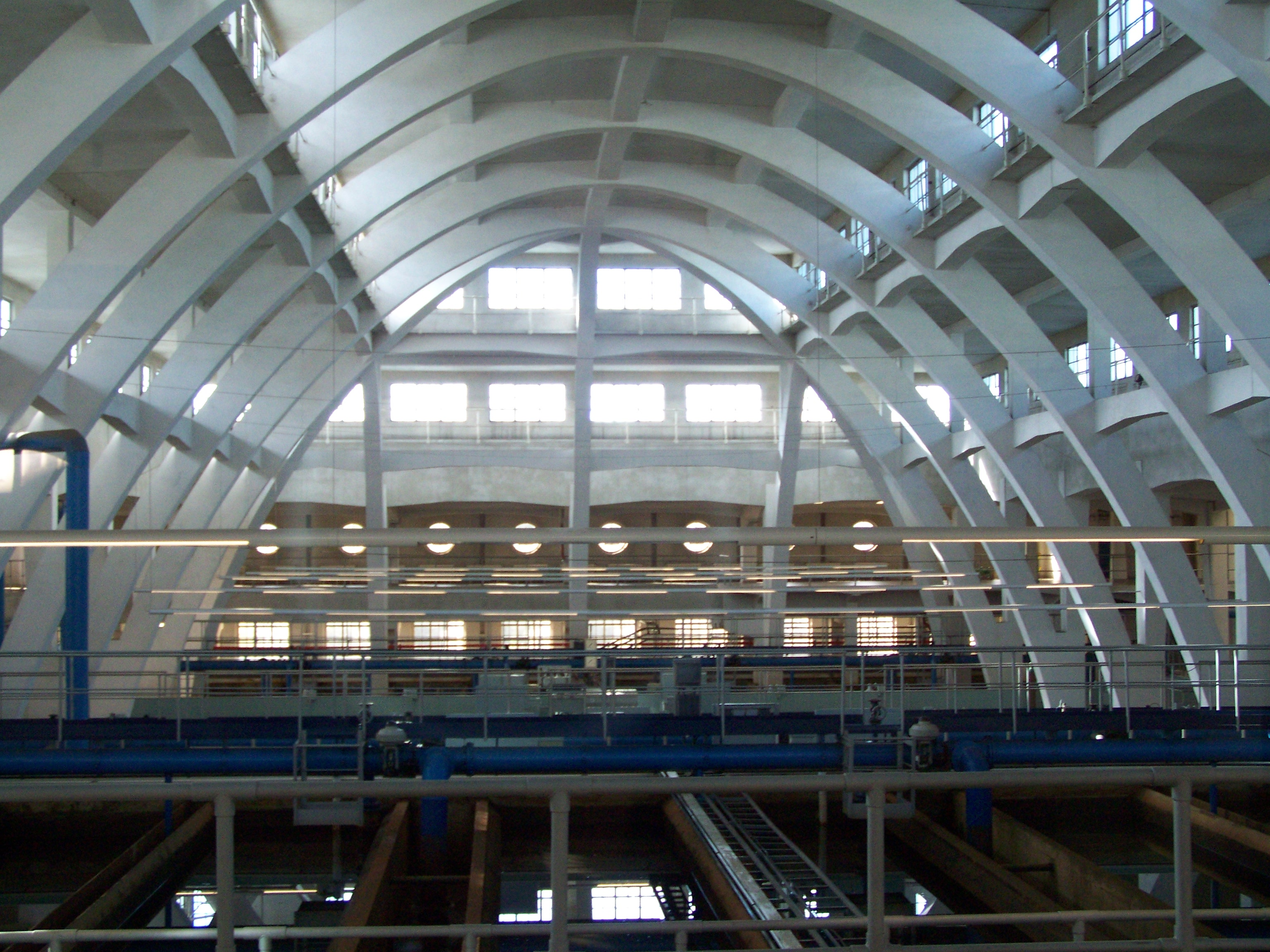 Pohled zevnitř